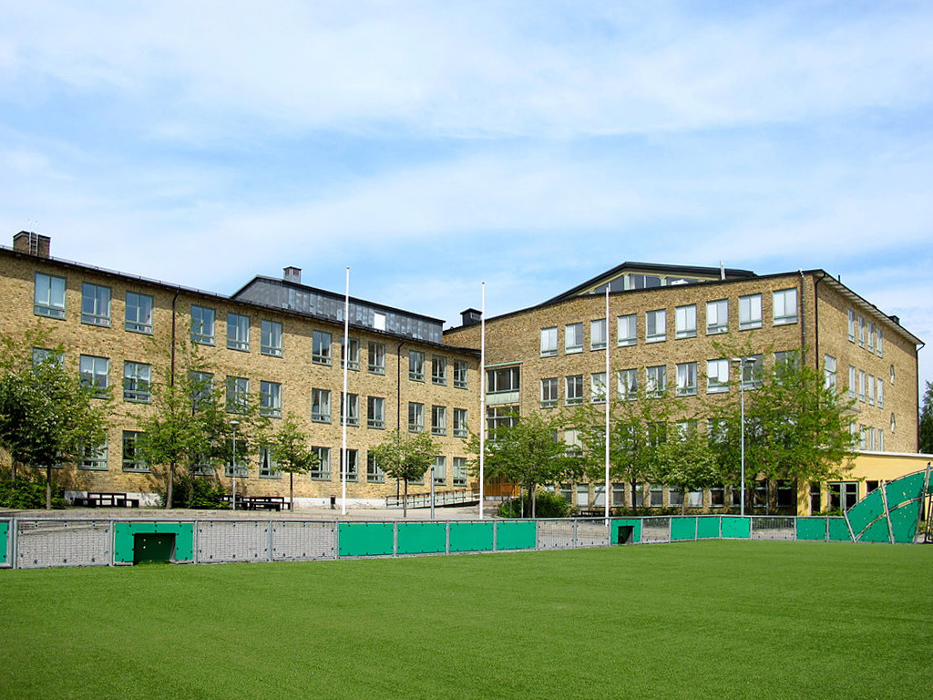 Aspuddens skola med fotbollsplan